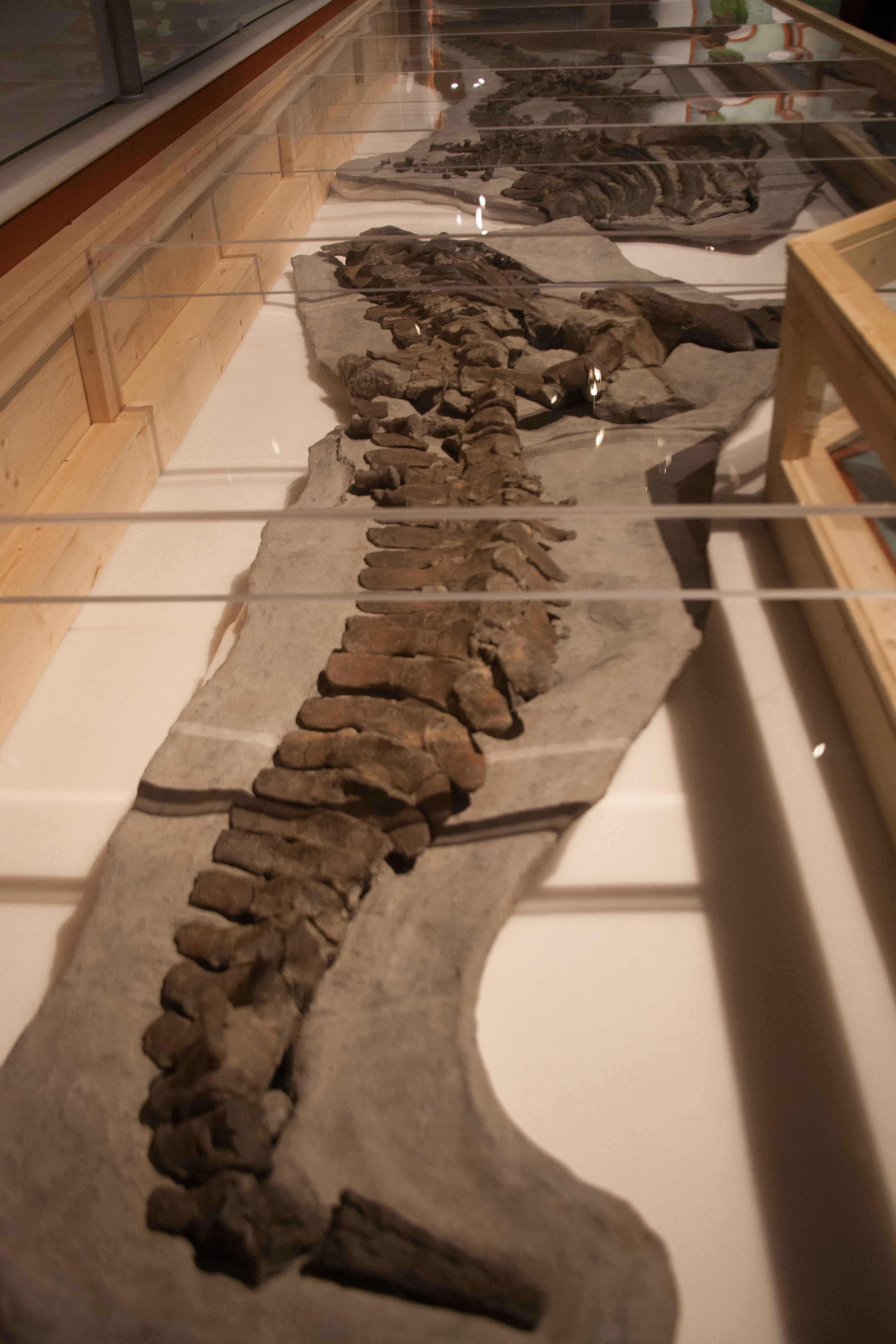 Albertonectes